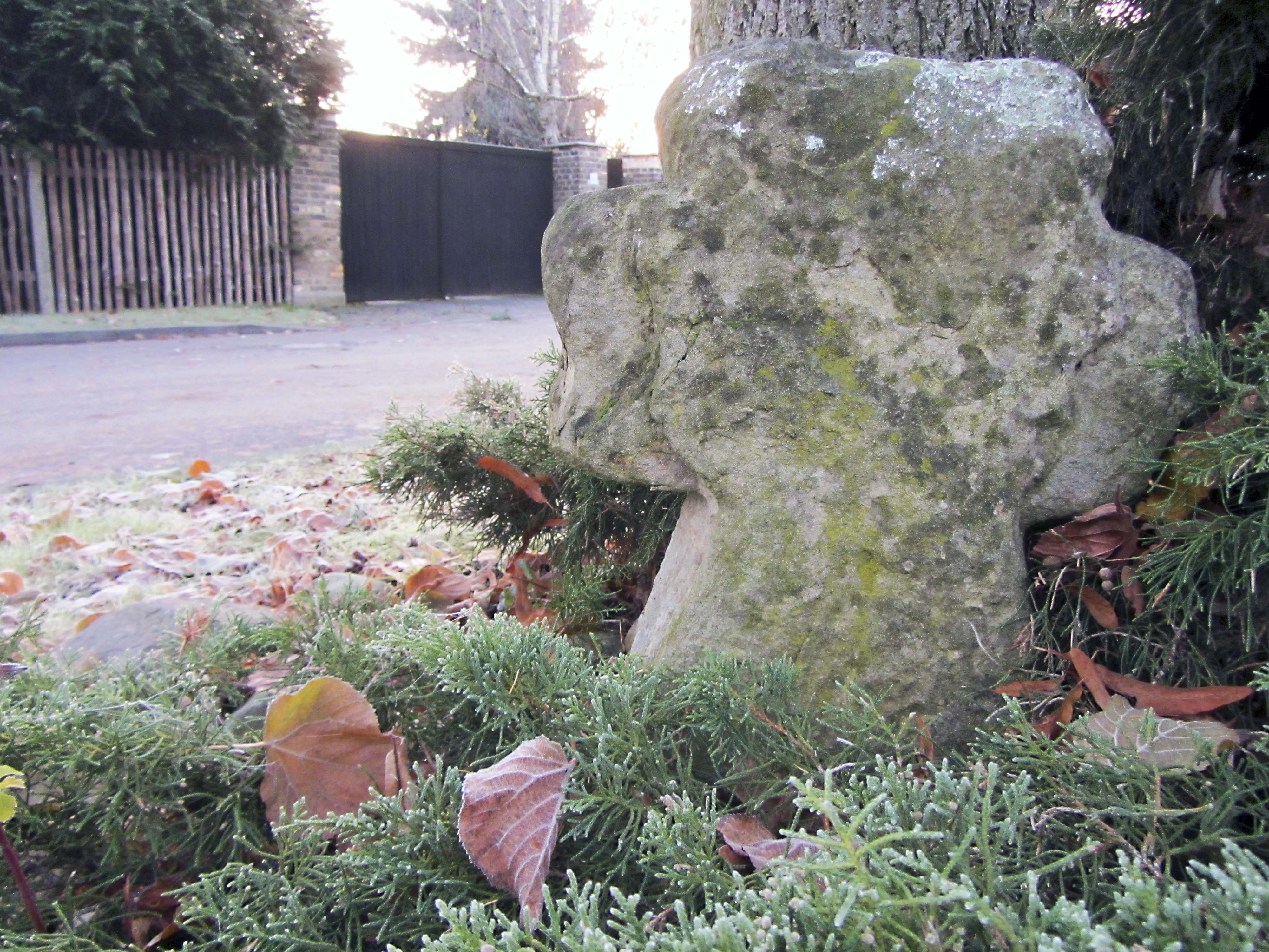 Steinkreuz in Kirchfährendorf